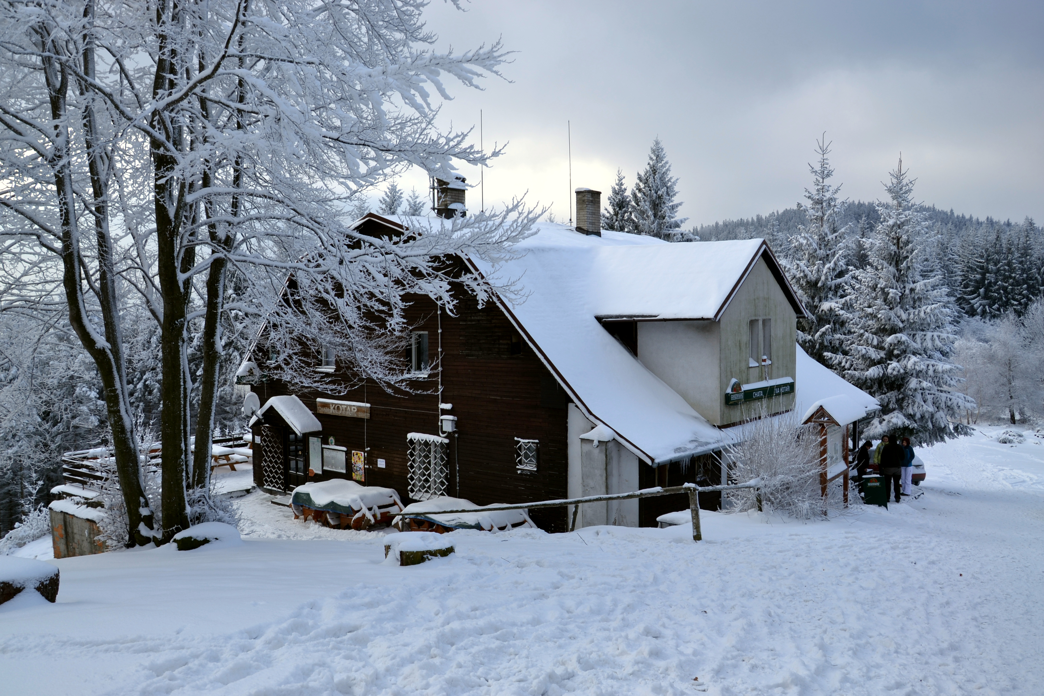 Chata Na Kotaři, Moravskoslezské Beskydy